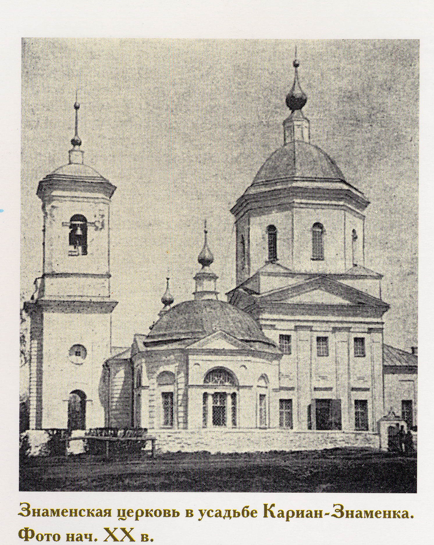 Знаменская церковь в усадьбе Кариан-Знаменское. Фото нач. XX века